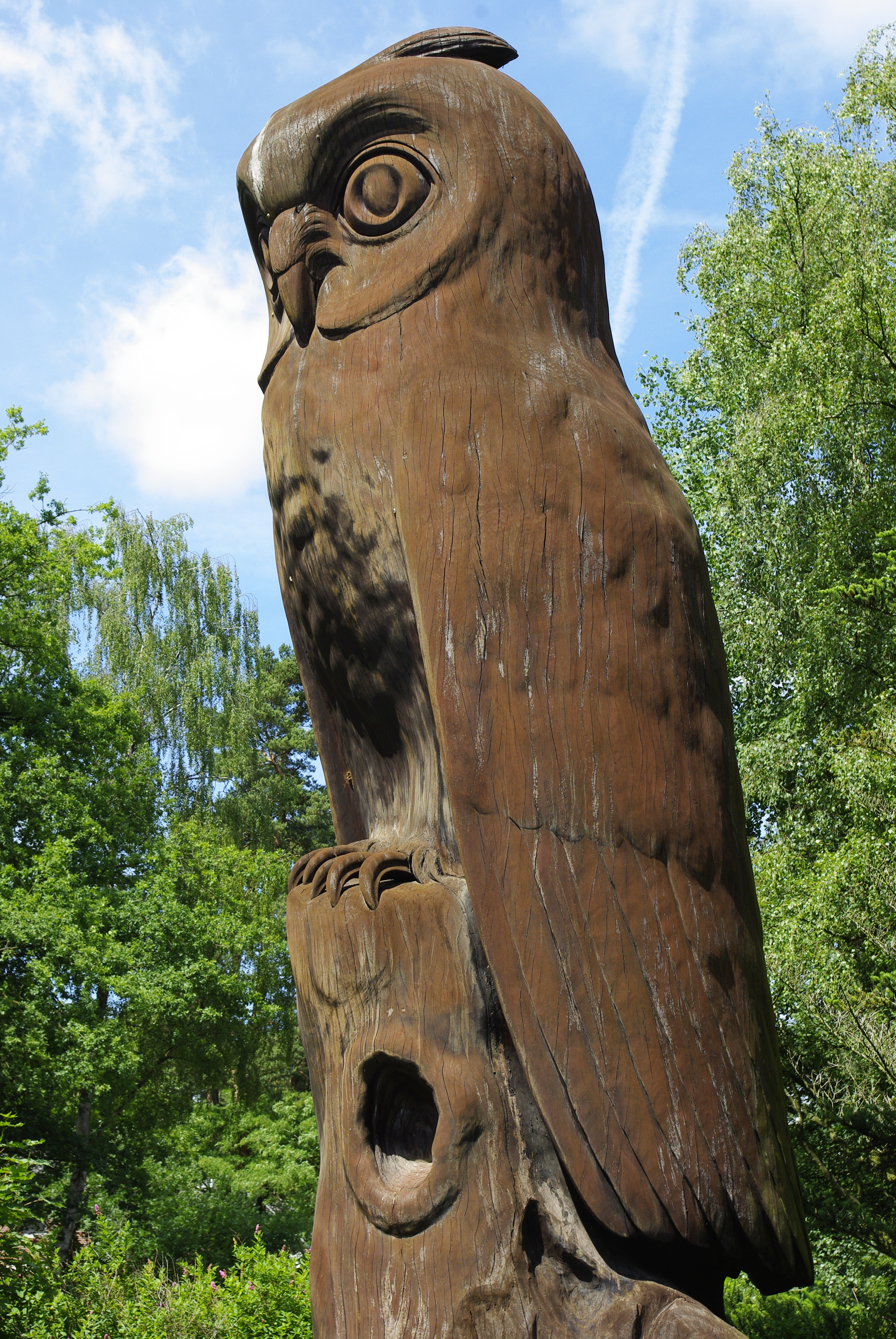 Geschnitzte Eule "Habru" aus Kosipo-Holz vom Bildhauer Erich Gerer. Entstanden: 1984, Gewicht: 17 Tonnen, Höhe: 7m, Durchmesser: 2,10m